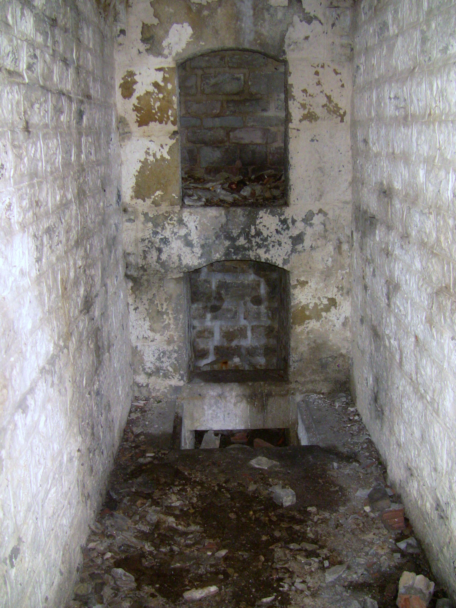 L'extrémité du couloir de l'abris de la carrière du fort de Planoise, à Besançon (Doubs, France)